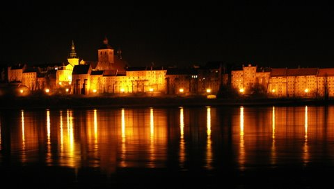 Grudziądz nocą